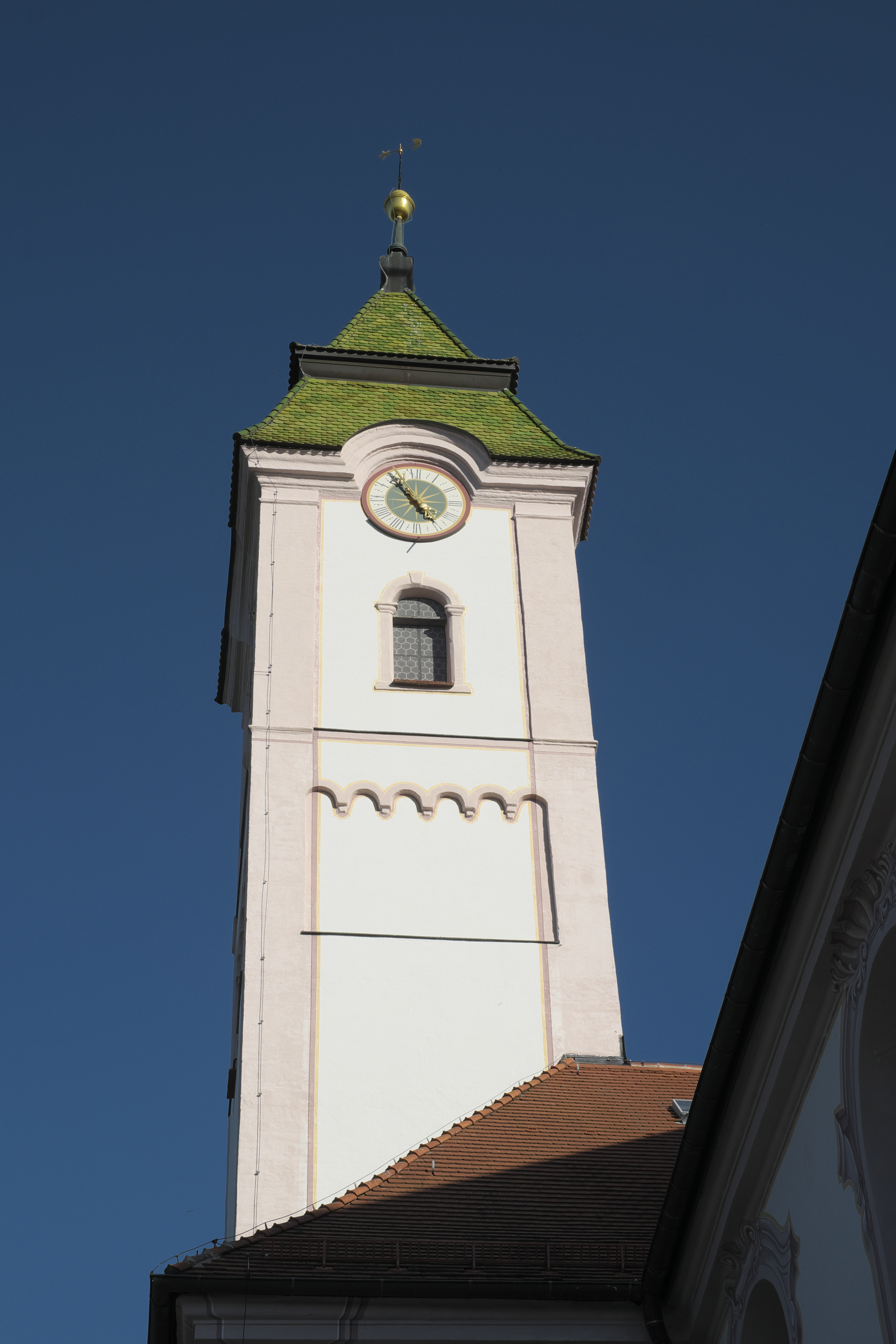 Katholische Pfarrkirche St. Gordian und Epimachus in Stöttwang im Landkreis Ostallgäu (Bayern/Deutschland), Turm